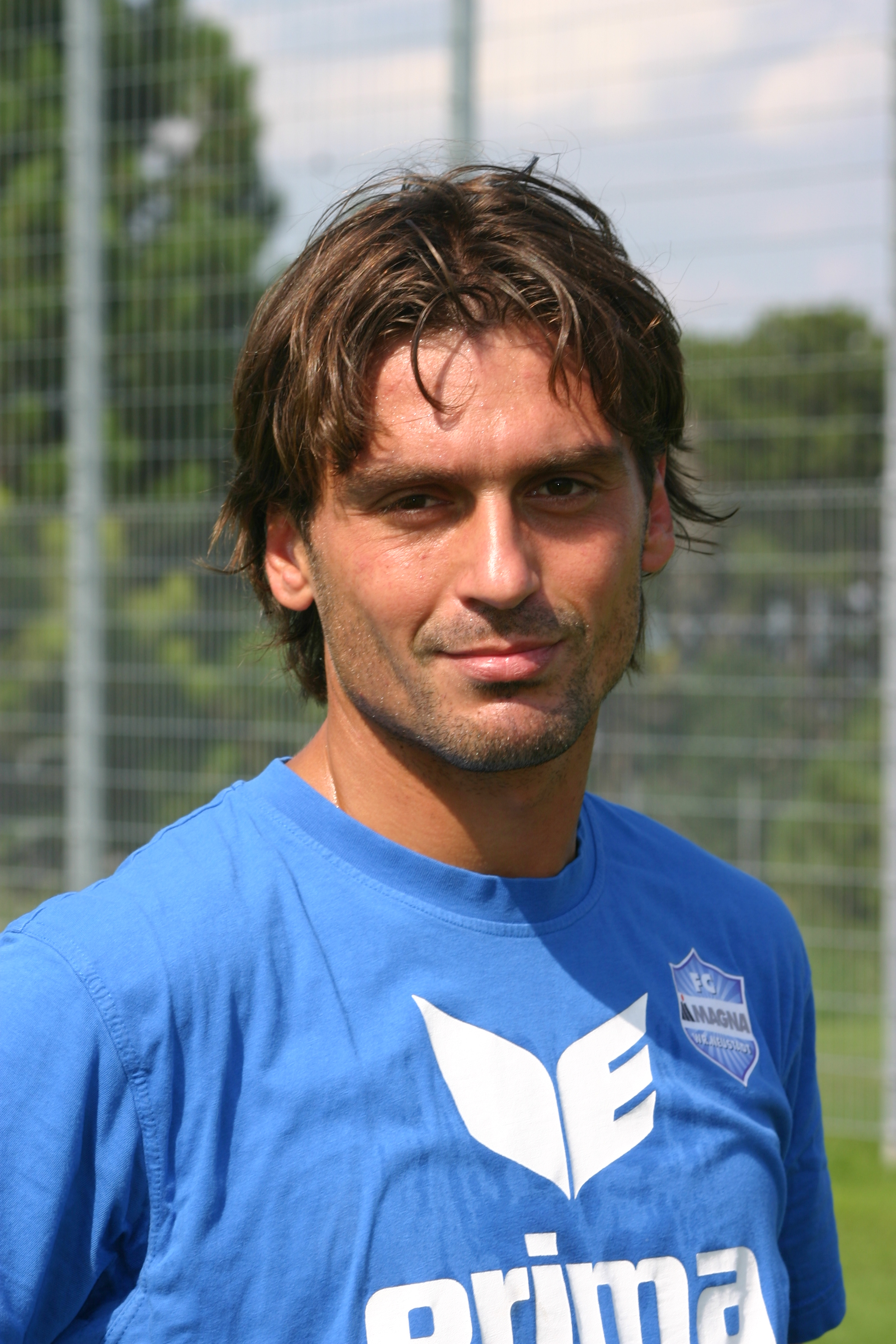 Sanel Kuljic FC Magna Wiener Neustadt